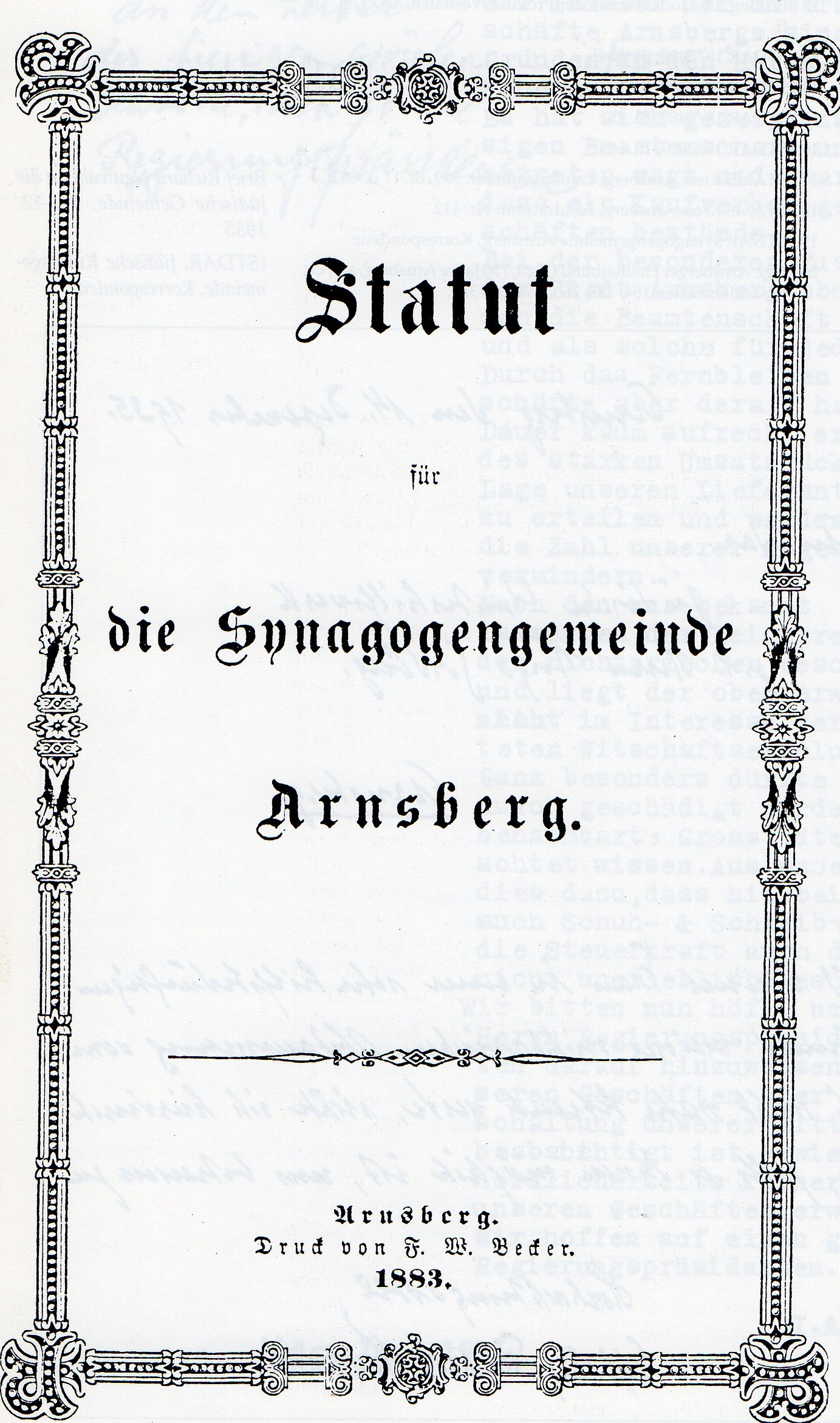 Deckblatt der Statuten der Synagogengemeinde Arnsberg